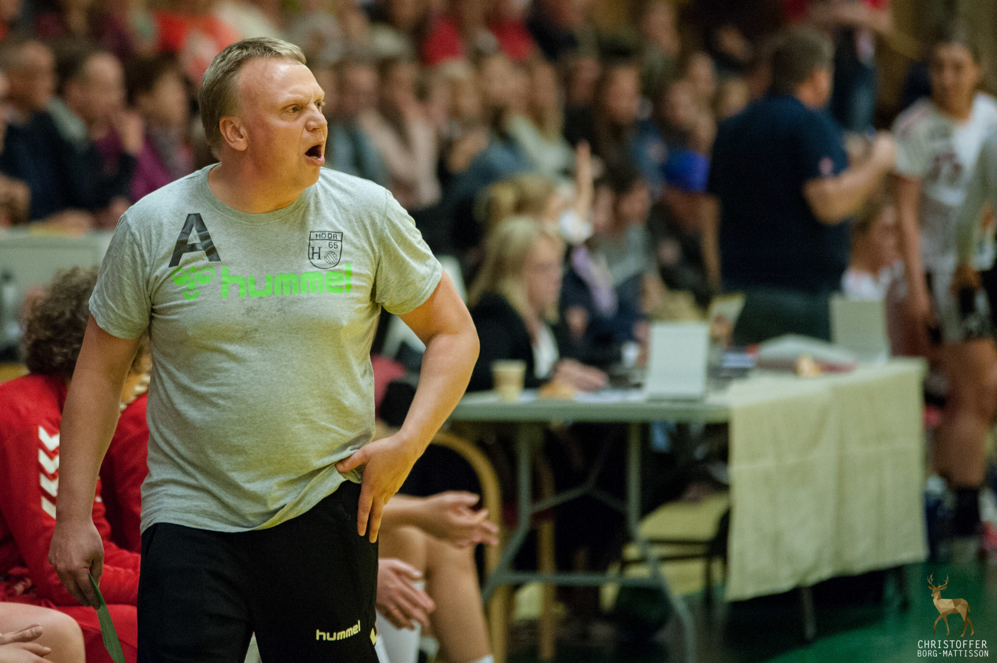 Ola Månsson - huvudtränare i H65 Höör